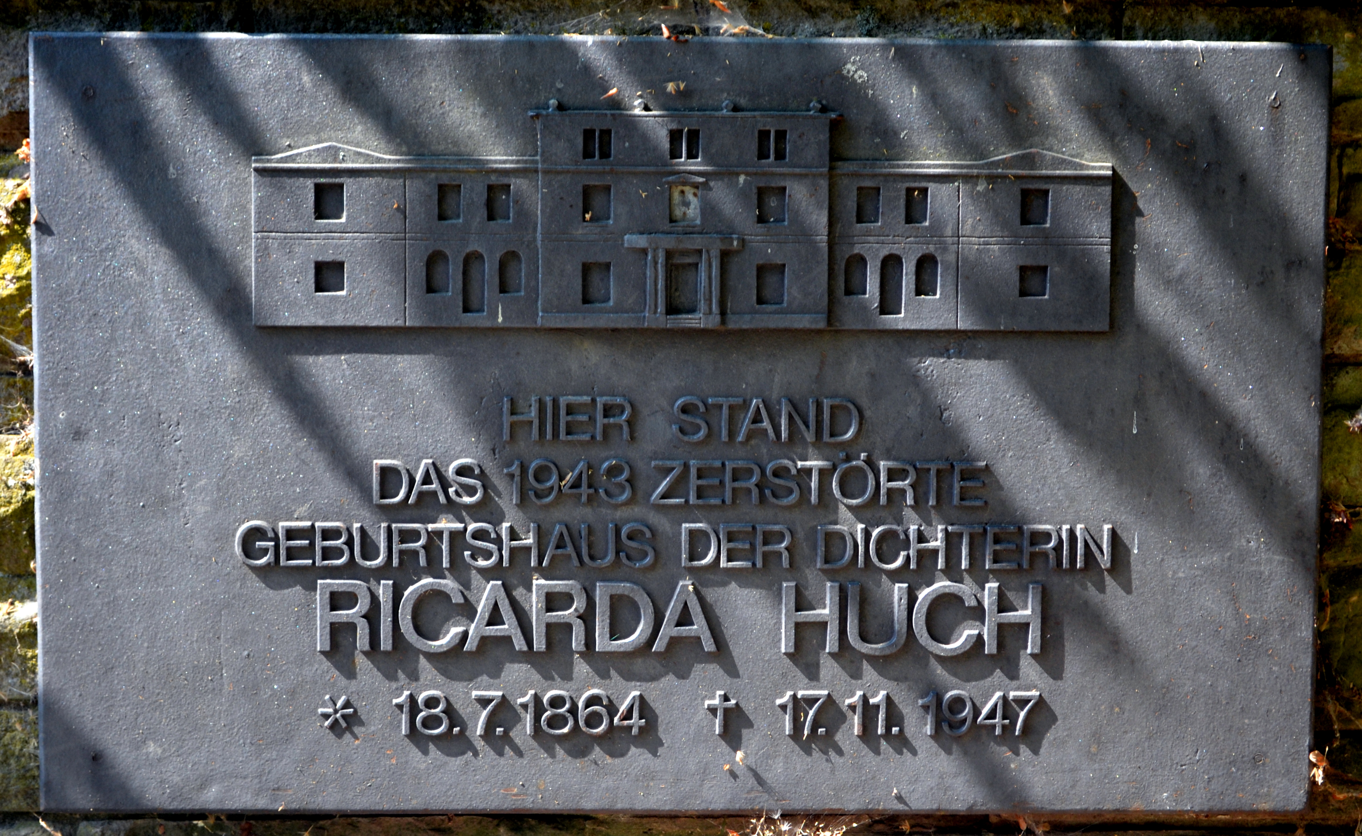 Braunschweig, Inselwallpark: Gedenktafel für das Geburtshaus der Schriftstellerin Ricarda Huch, die am 18. Juli 1864 in der ehemaligen Bierbaumschen Villa, Petrithor-Promenade 16, heute Inselwallpark, geboren wurde.